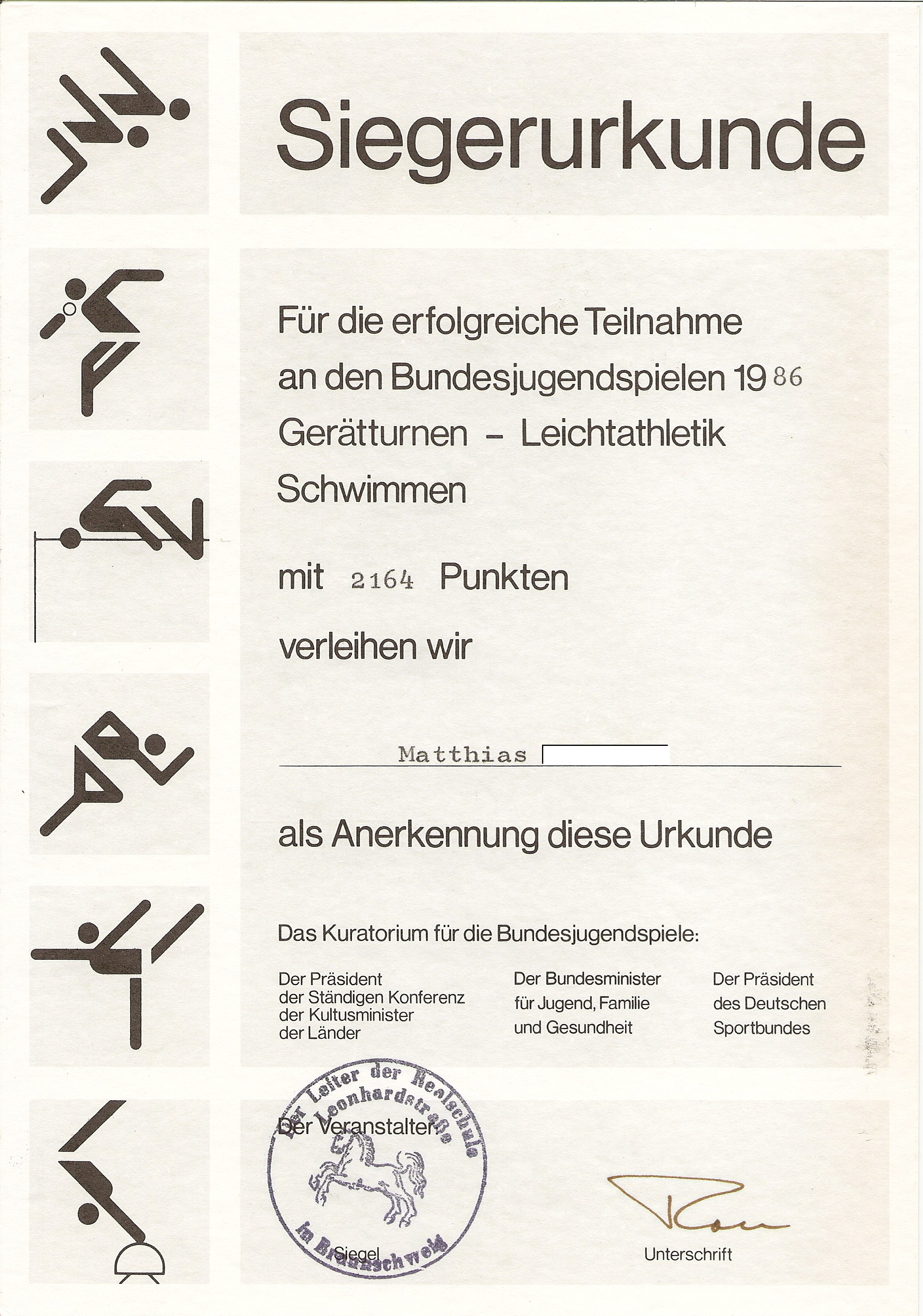 Bundesjugendspiele (Teilnehmerurkunde)